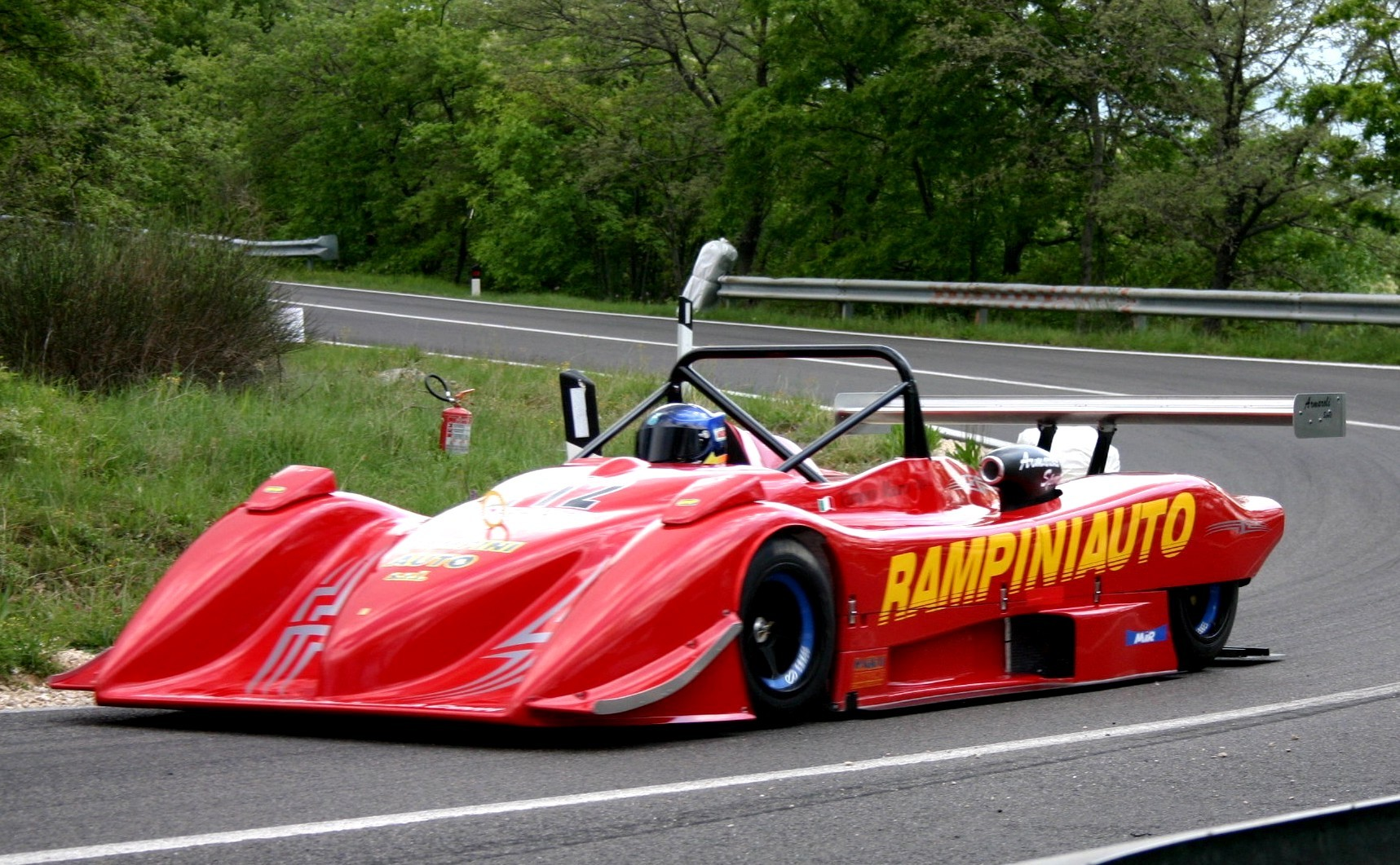 Una Osella PA 20 S BMW. Foto scattata da me il 7 maggio 2006.